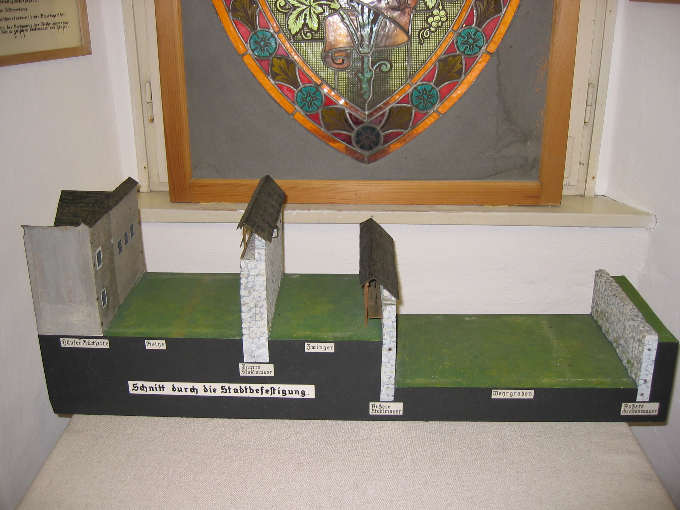 Querschnitt durch die Freistädter Stadtmauern